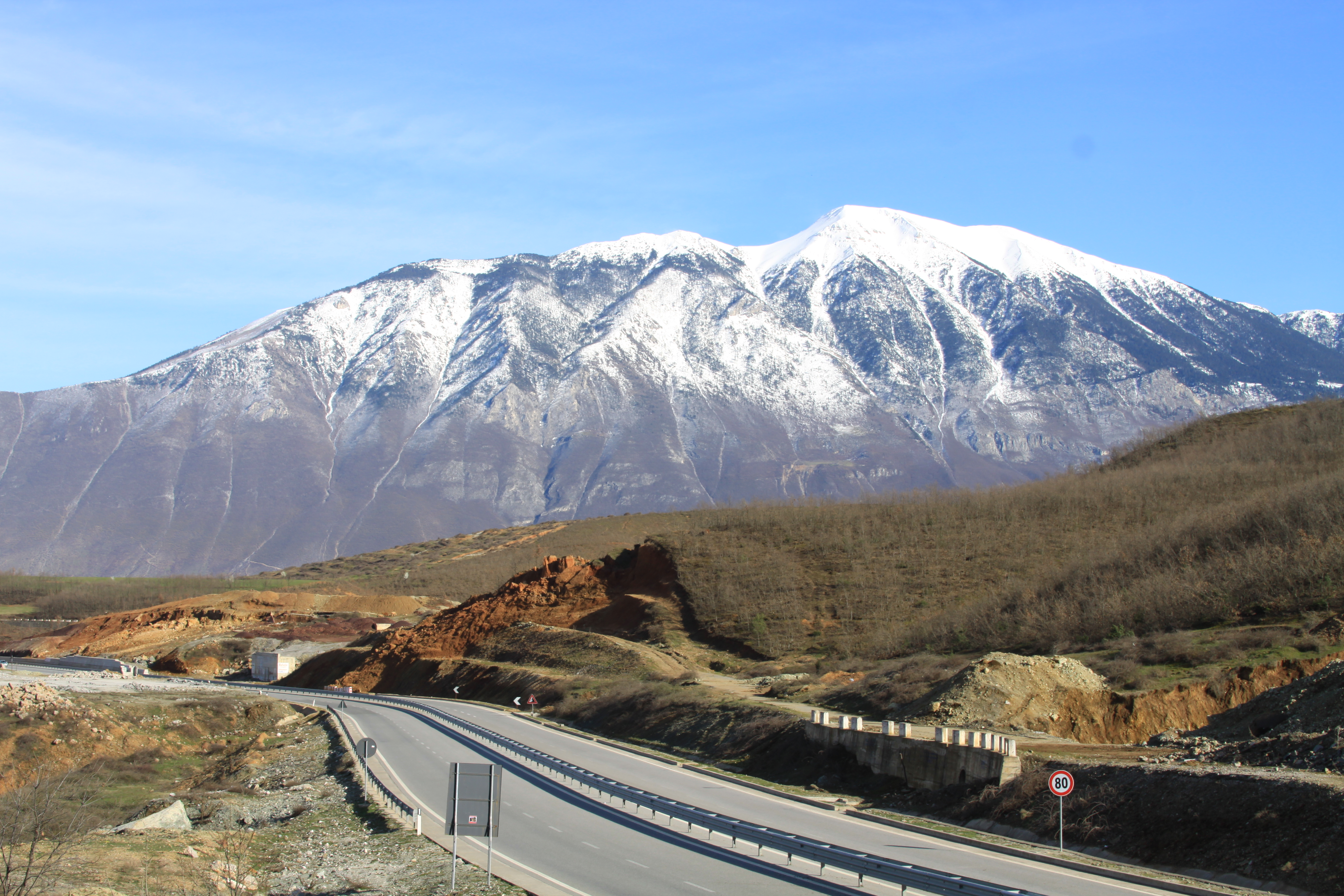 Gjallica Mountain from the High Way of Kalimash